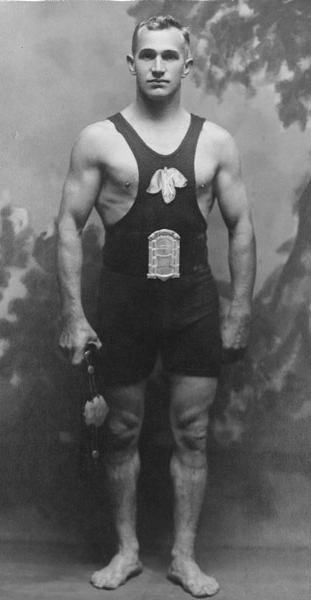 Eino Leino (wrestler)